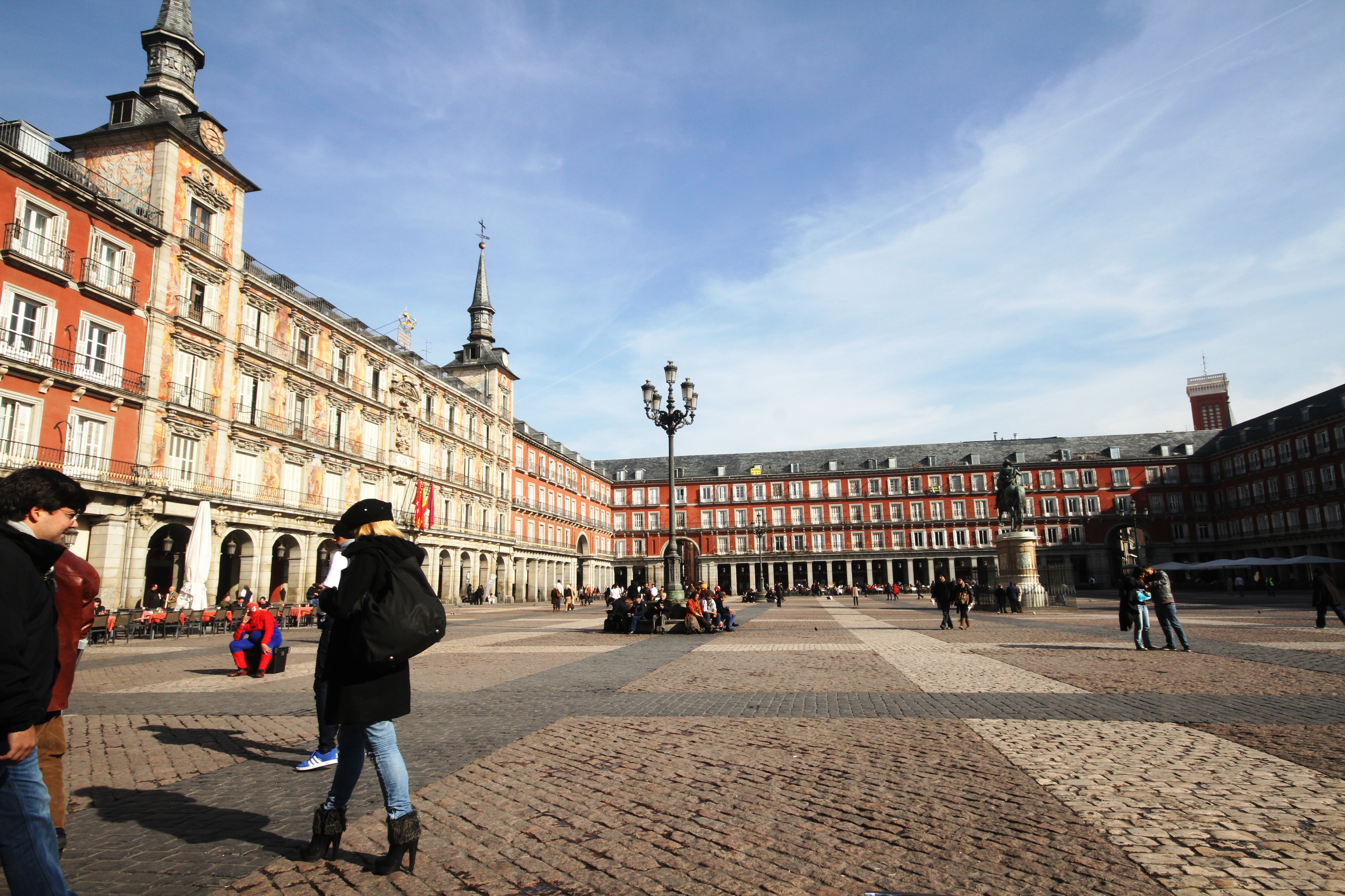 Plaza Mayor - Madrid